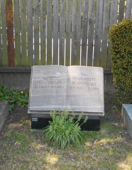 Döblinger Friedhof-Alfred Planyovsky